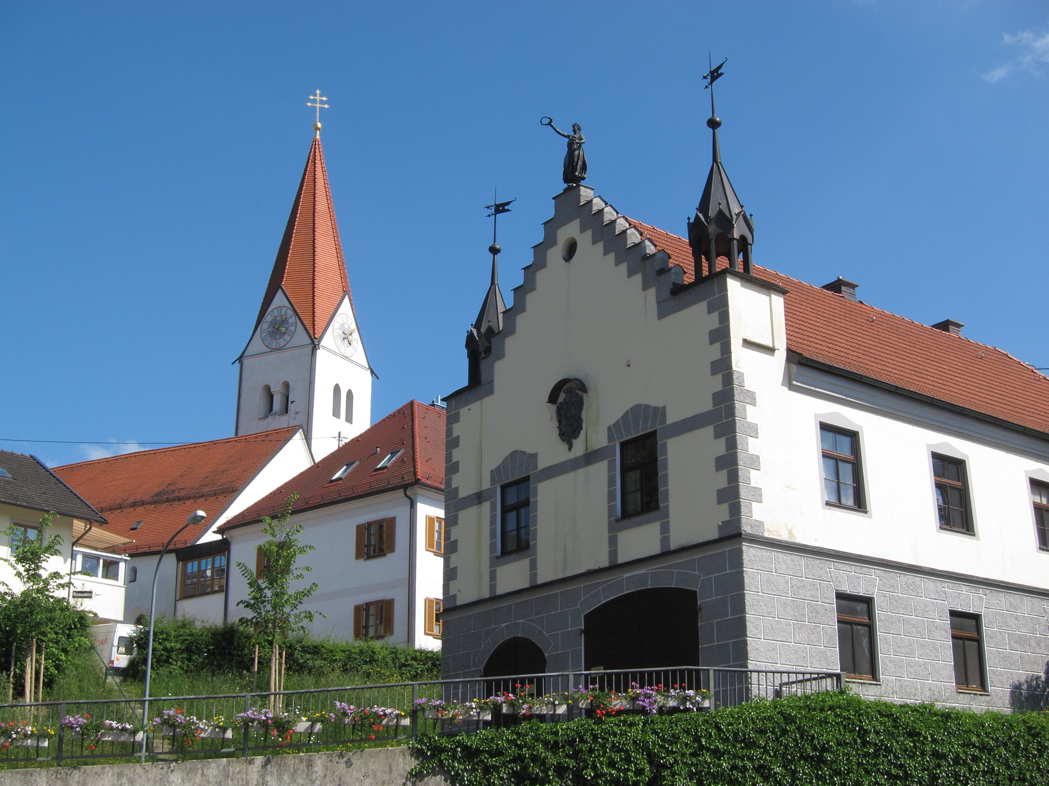 Marktplatz 3; Ehemaliges Feuerwehrhaus, eingeschossiger Satteldachbau auf hohem Kellergeschoss mit Treppengiebel und flankierenden Giebeltürmchen in historisierendem Stil, Ende 19. Jahrhundert.